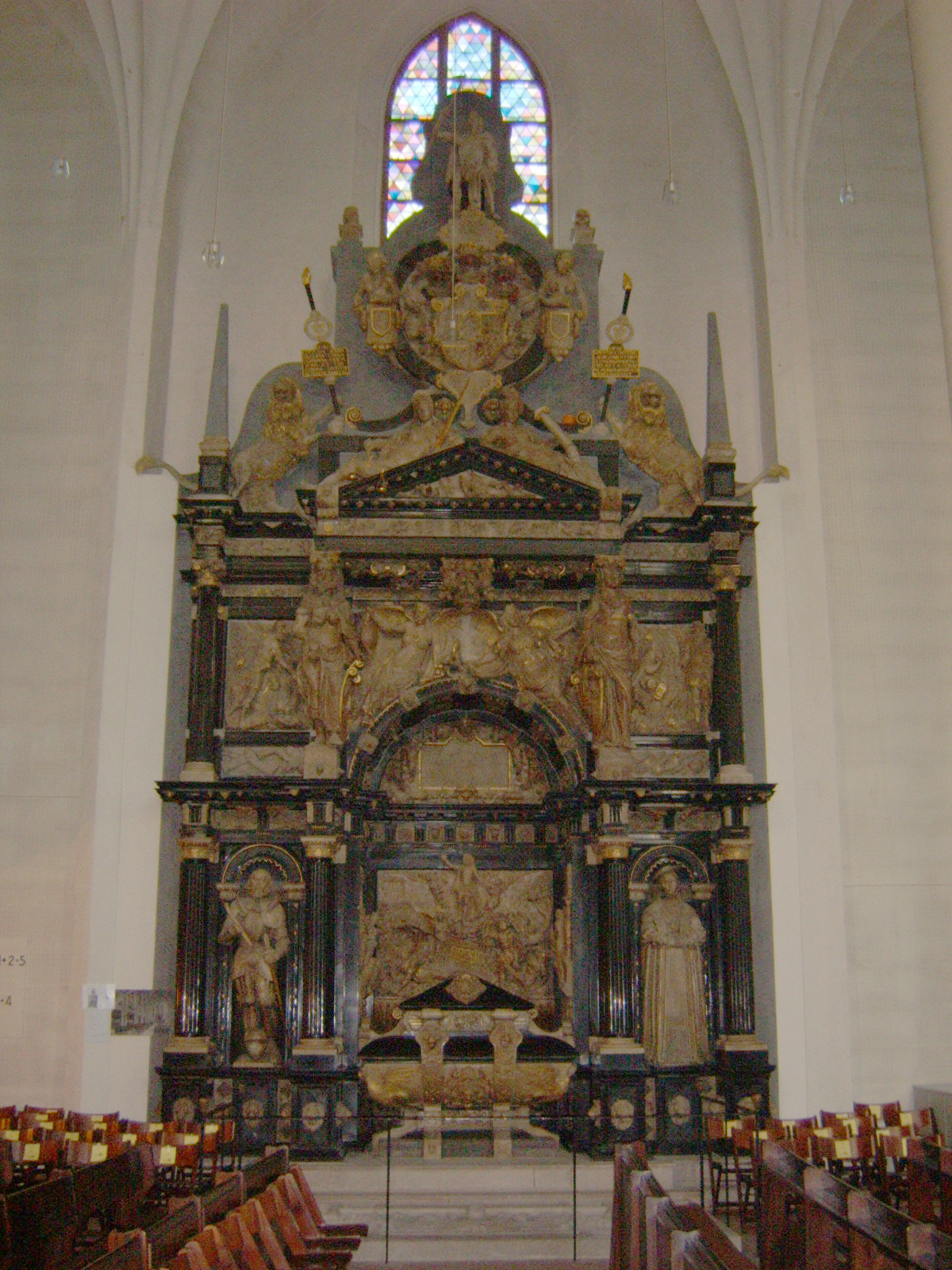 Das Epitaph Landgraf Philipps in der Martinskirche (Kassel) selbst photographiert von Carroy am 9.11.2005